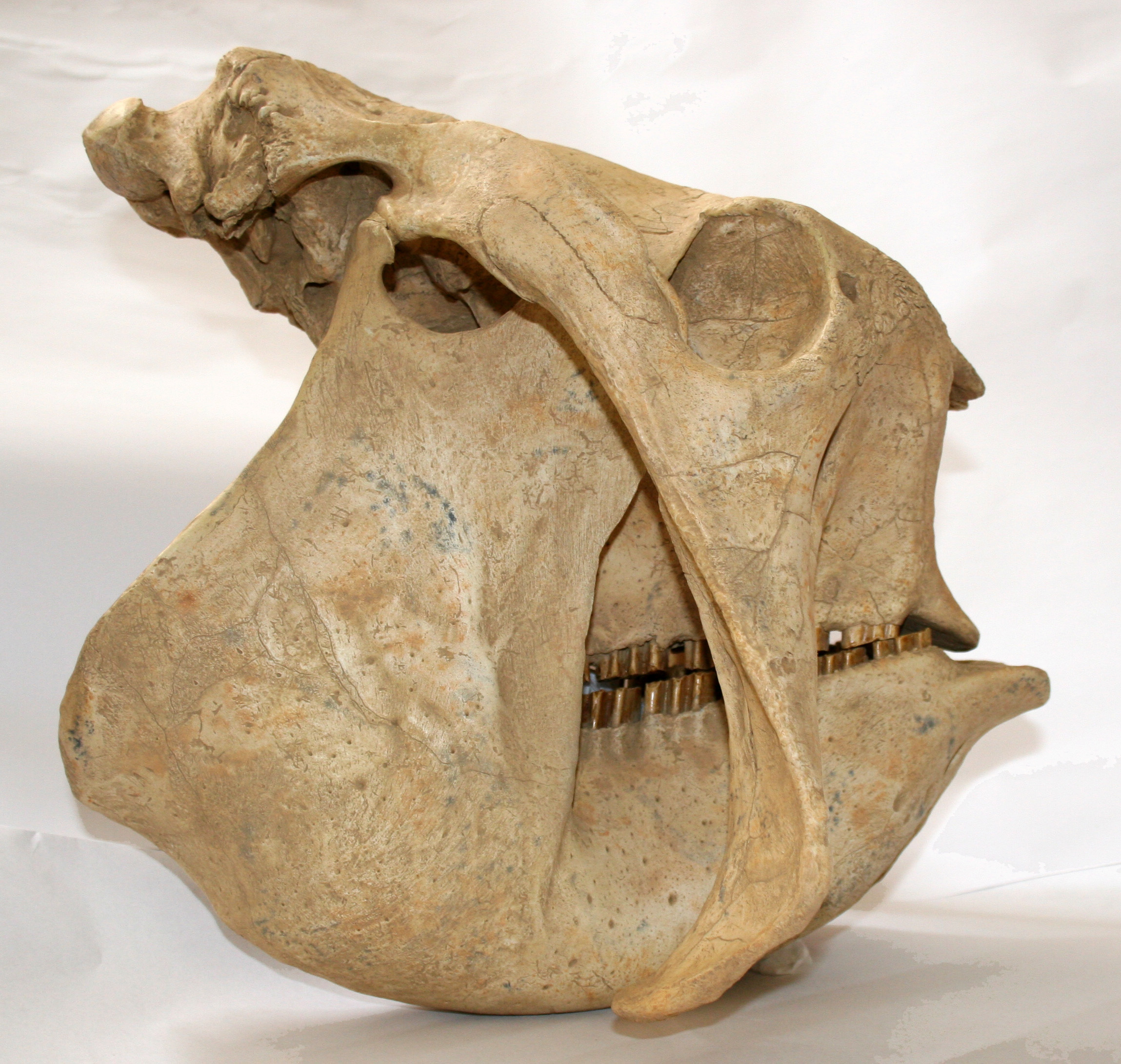 Craneo de Gliptodonte originario de Uruguay. 31cm de alto.